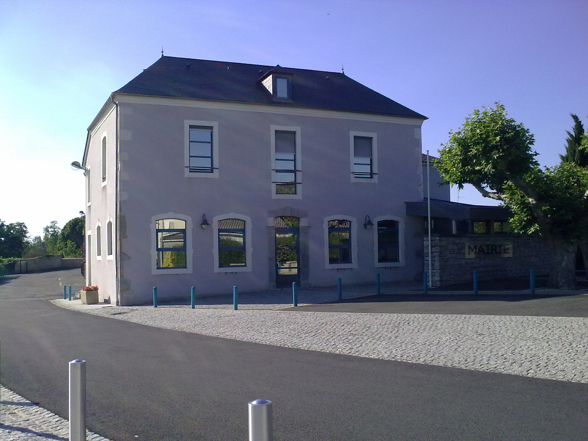 Mairie de Meillon.